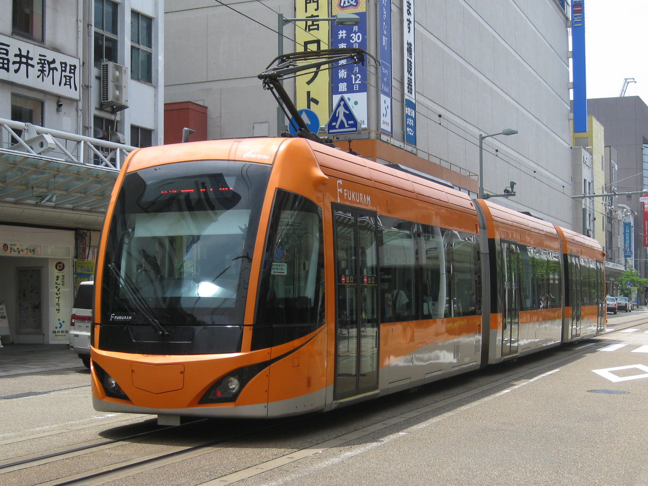 フクラム第一編成